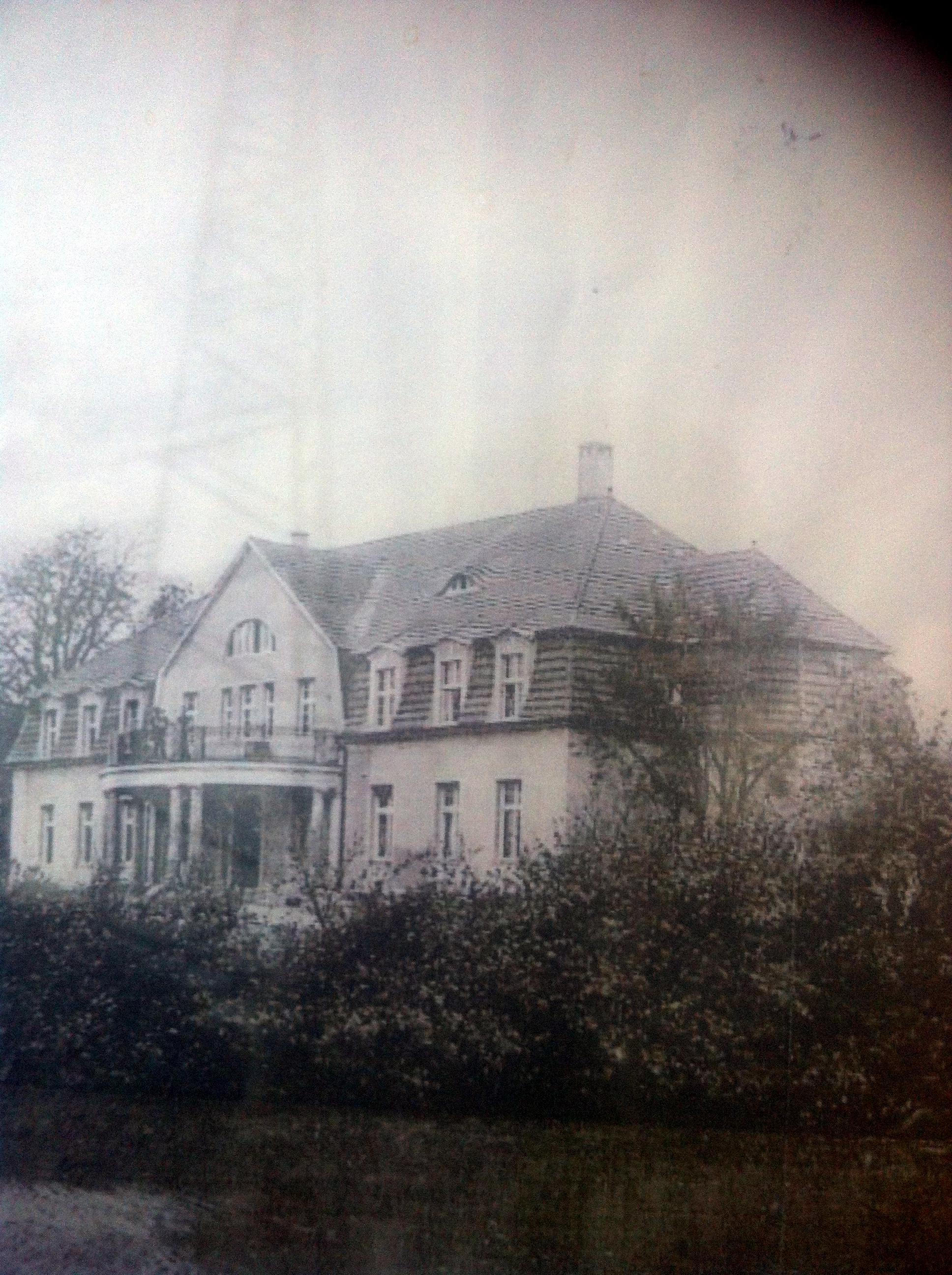 Herrenhaus des Gutes Zirkwitz (damals im Besitz der Familie von Sydow). Diverse zugehörige Arbeitsgebäude, Silos und Stallungen etc. befanden sich noch vor dem Rondell vor dem Haus.